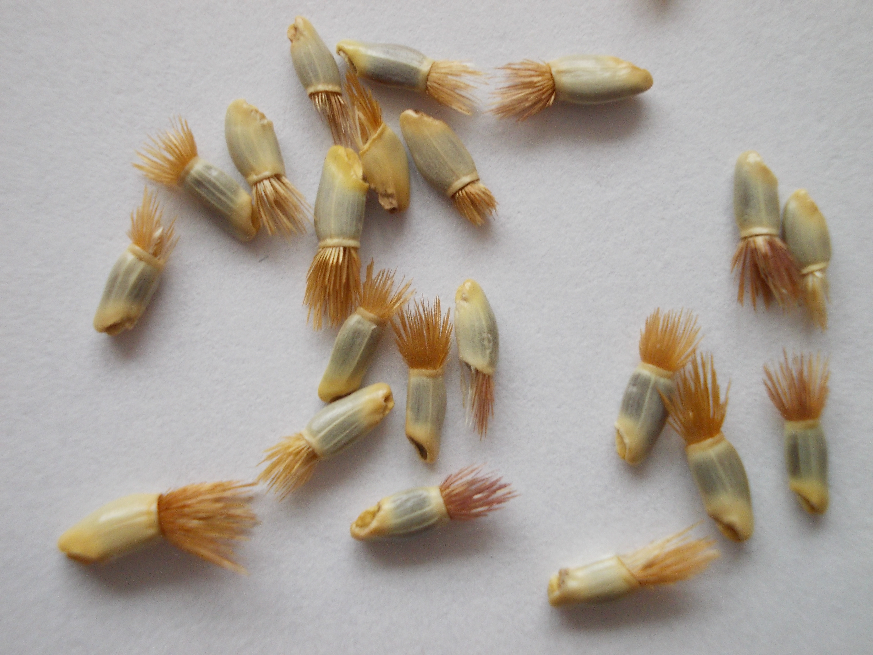 Семена василька - Centaurea cyanus